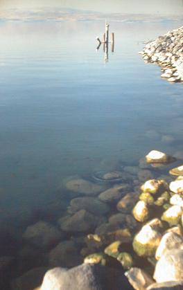 Foto vanaf de oostelijke oever van het Meer van Galilea, genomen in noordwestelijke richting. Oktober 1991.